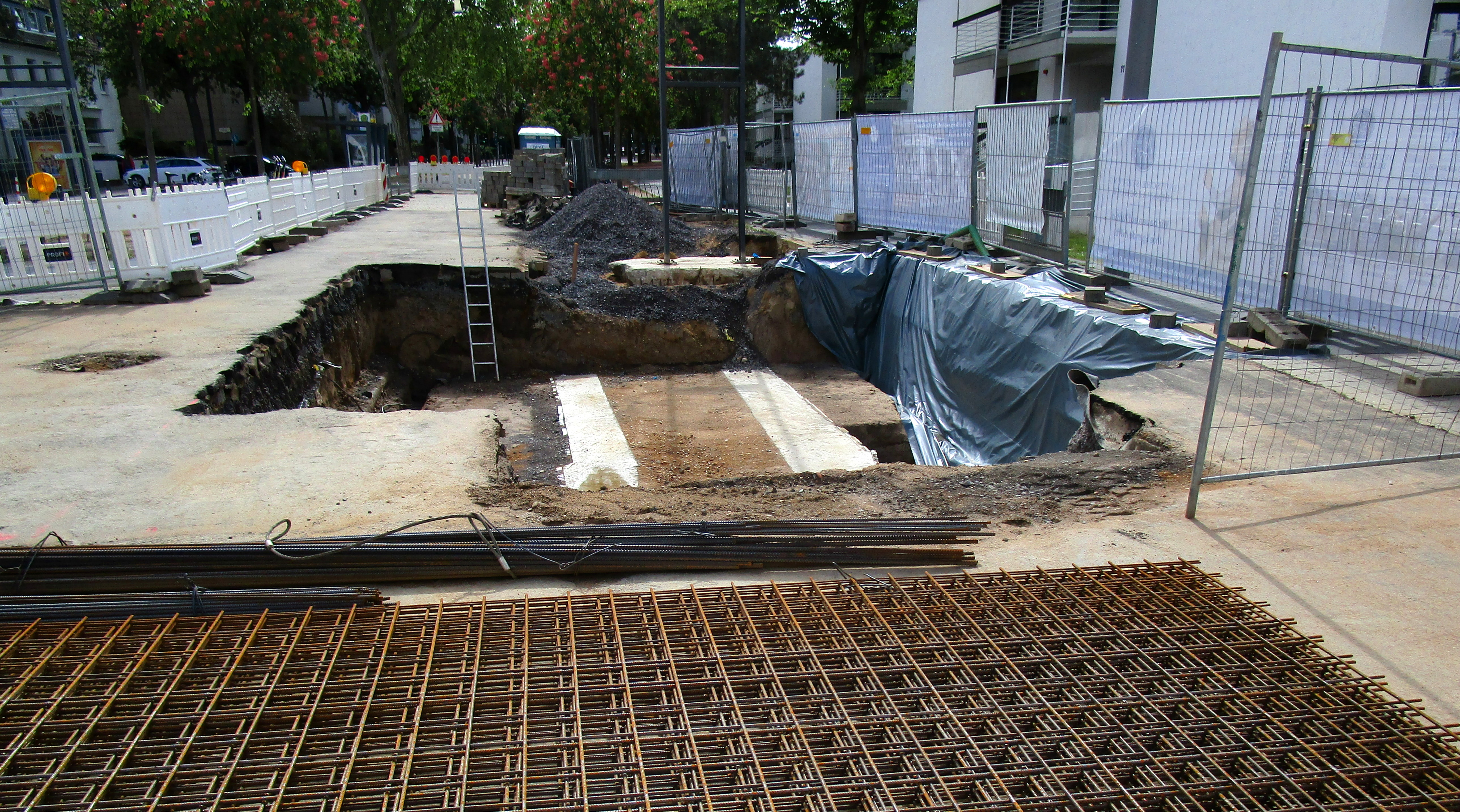 Vorarbeiten für die Wiederaufstellung des Bundesbüdchens, Heussallee (Ecke Platz der Vereinten Nationen), Bonn-Gronau